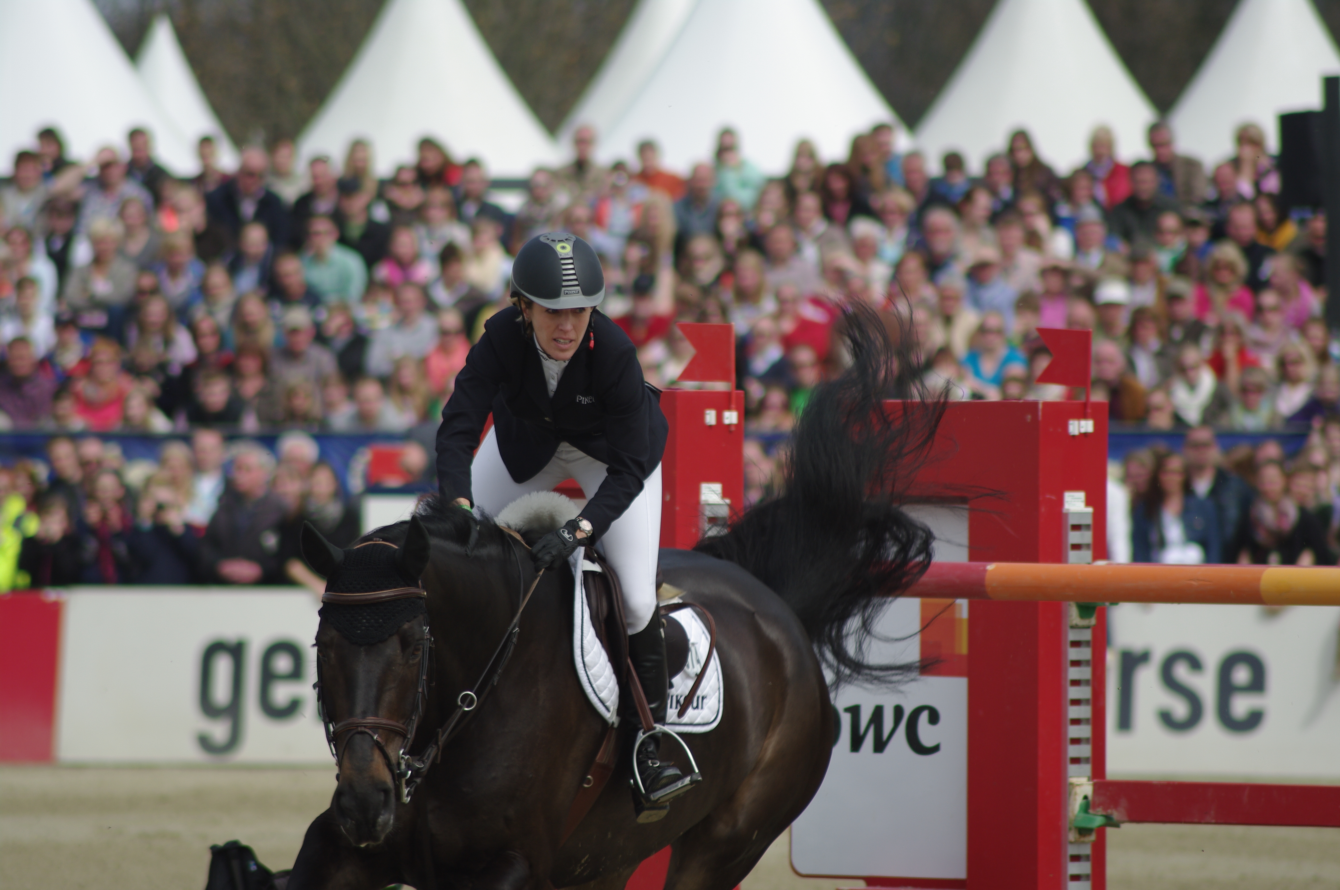 Horses & Dreams 2013: Meredith Michaels-Beerbaum mit Unbelievable 5